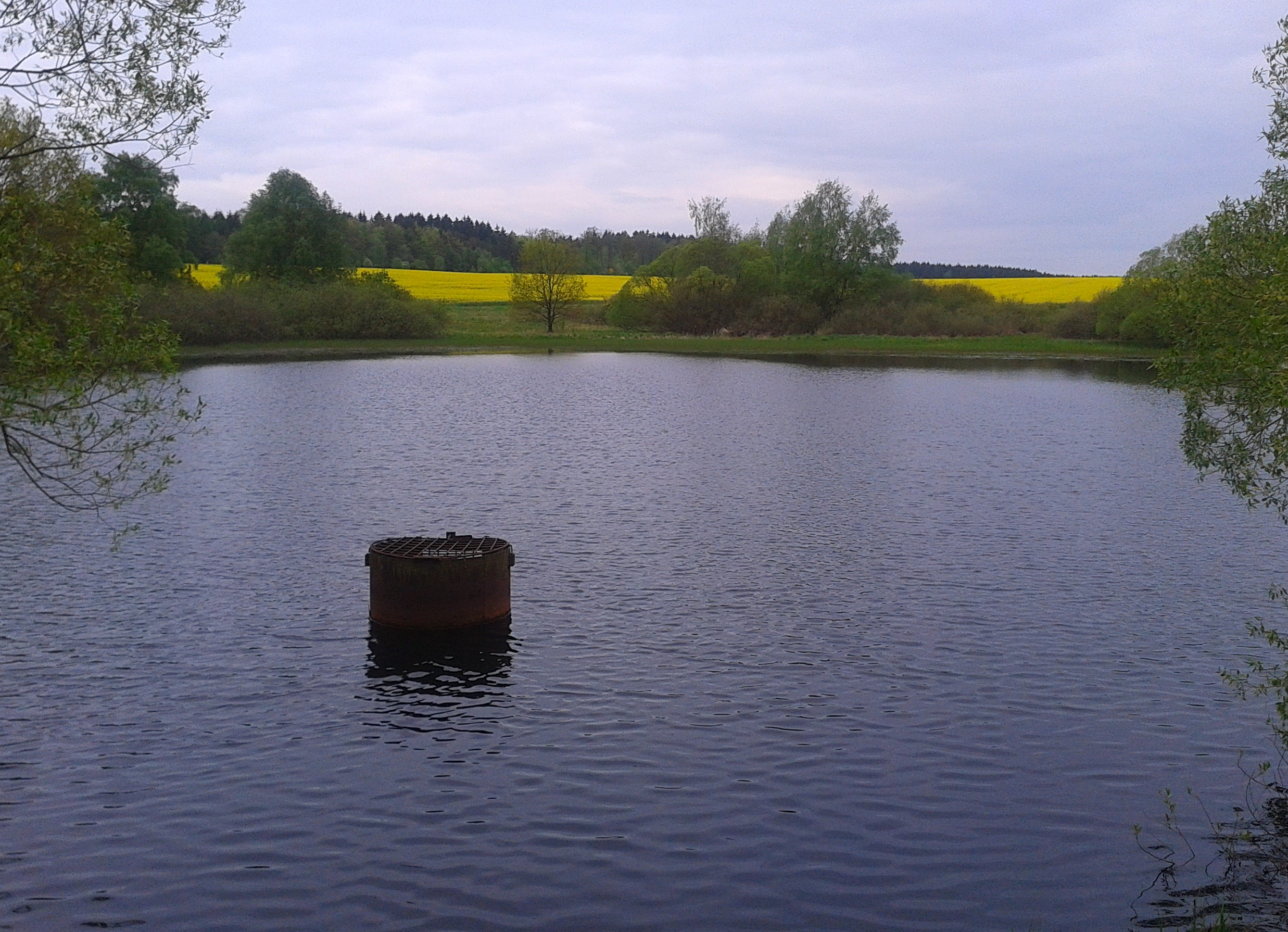 der faule Pfützenteich